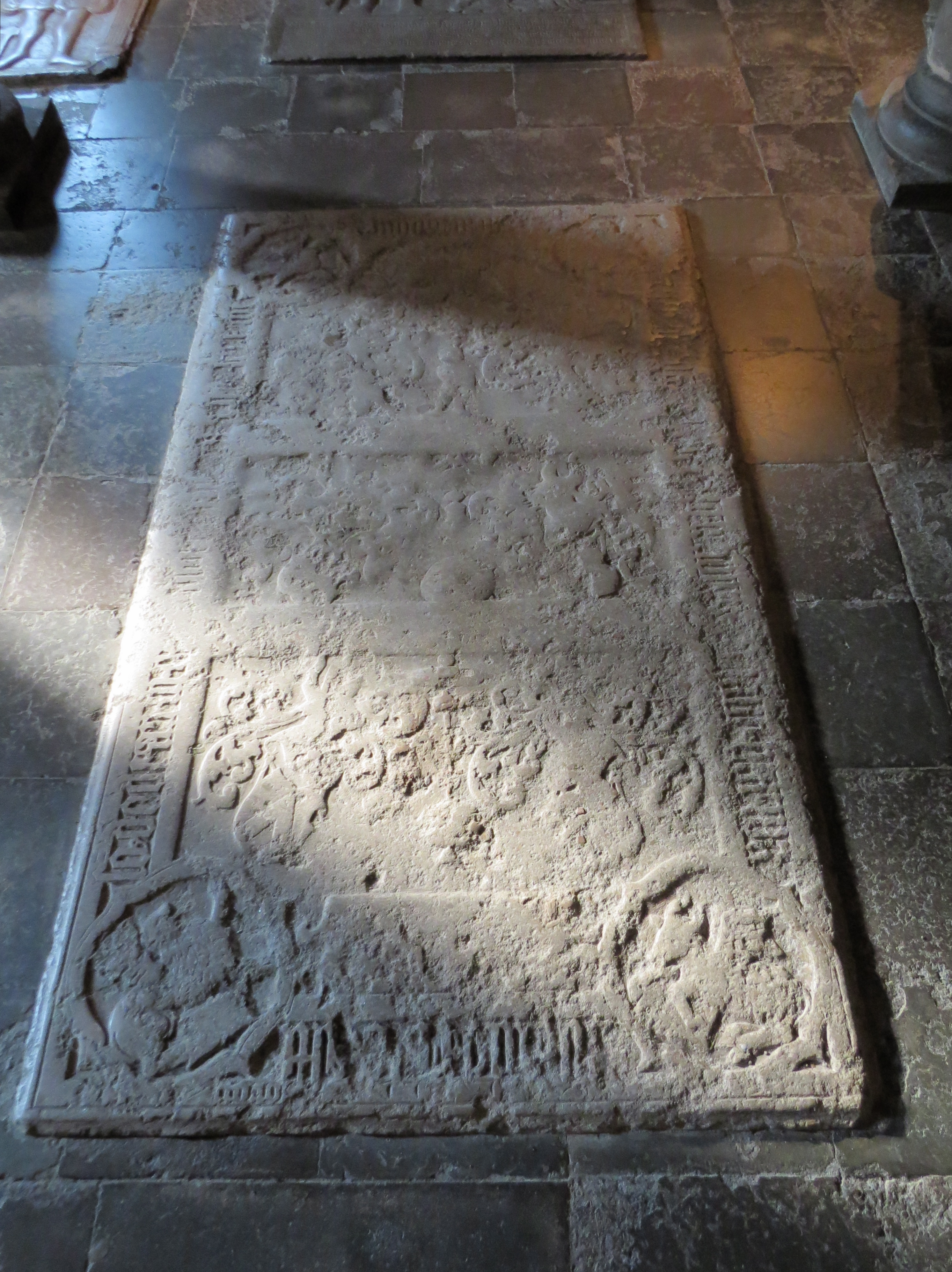 Truid Gregersen Ulfstand (1487-1545), rigsråd, gravsten i Lund Domkirkes krypt